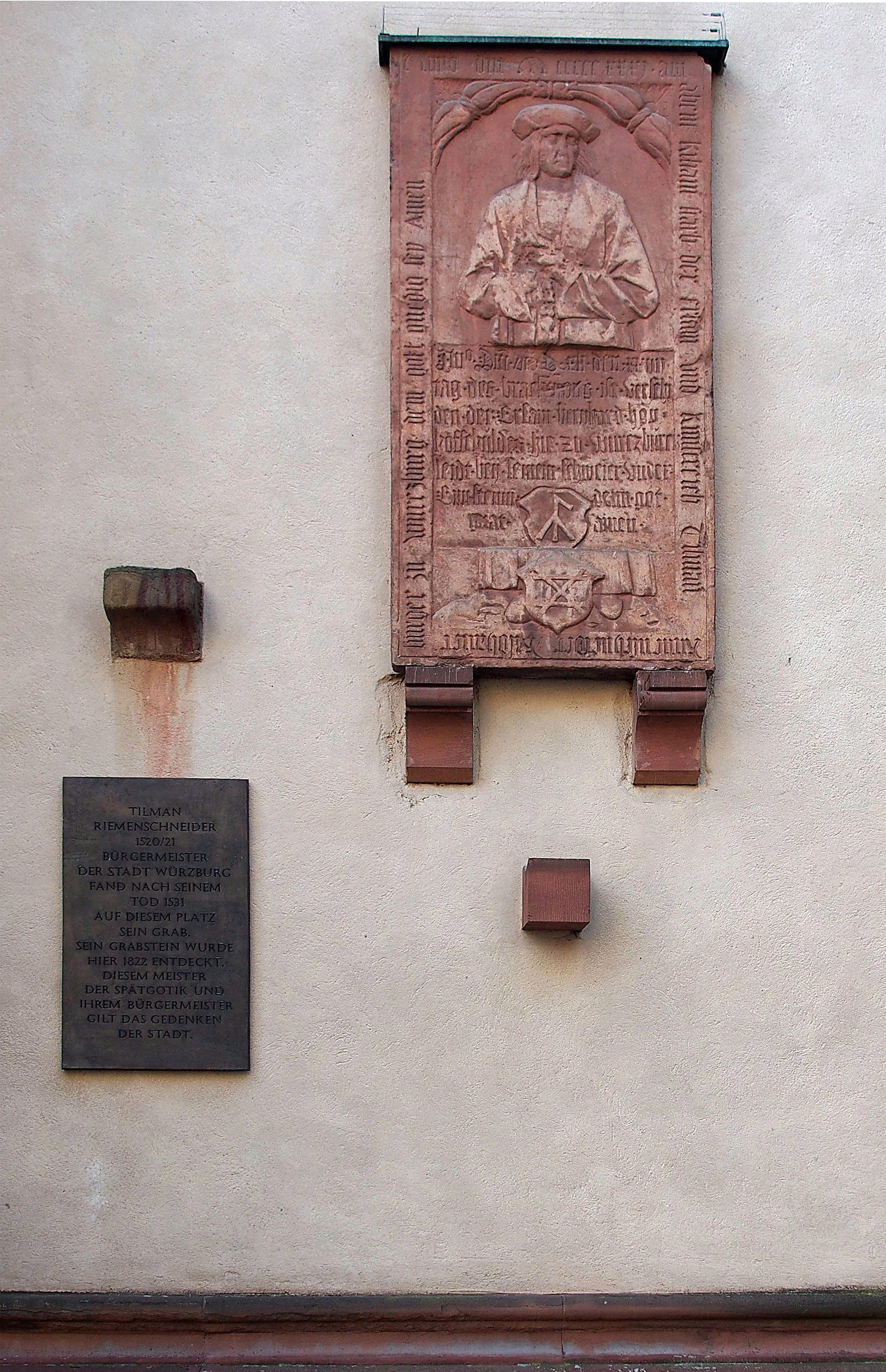 Grabstein von Tilman Riemenschneider an der Nordseite der Domkirche St. Kilian in Würzburg